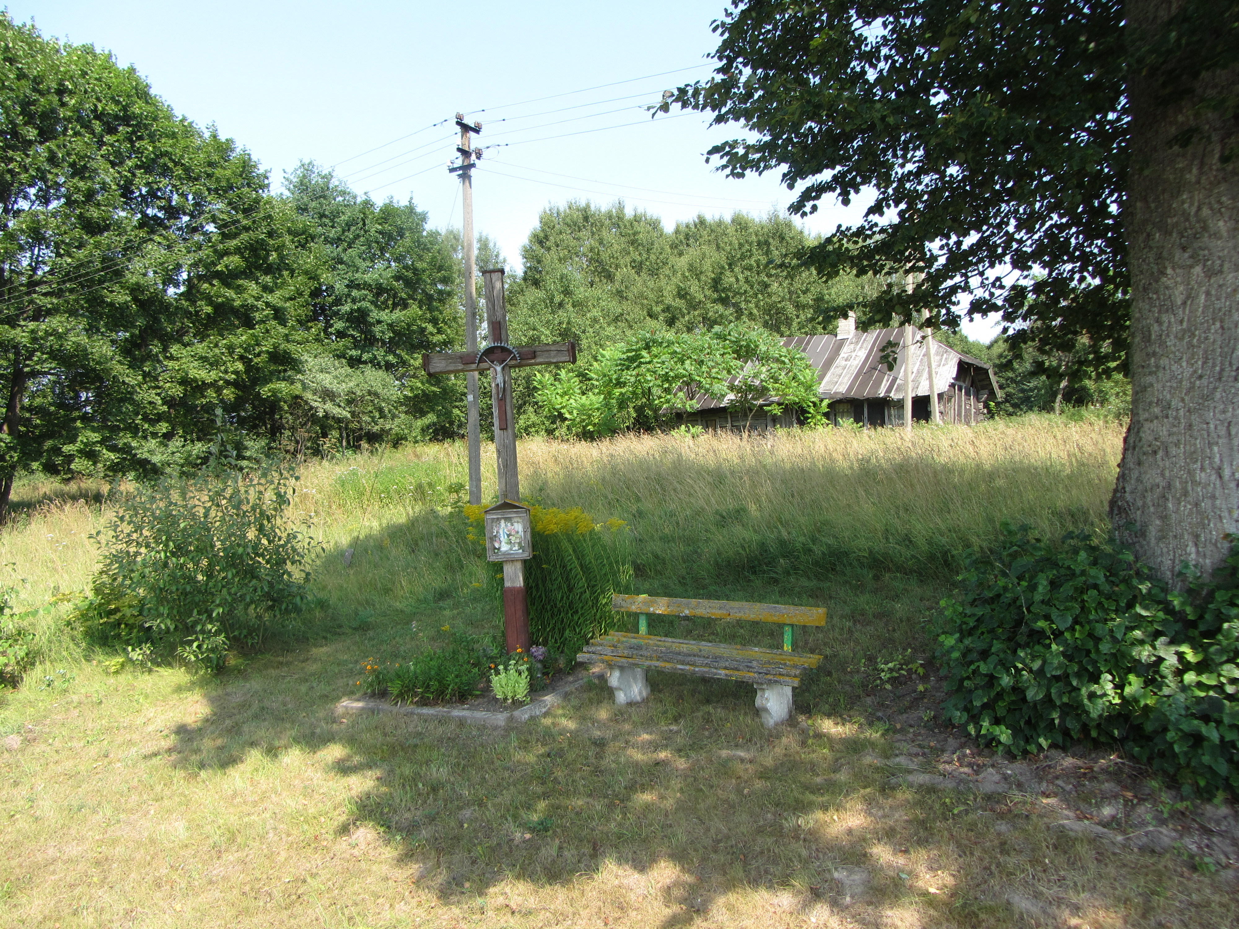 Paberžės sen., Lithuania